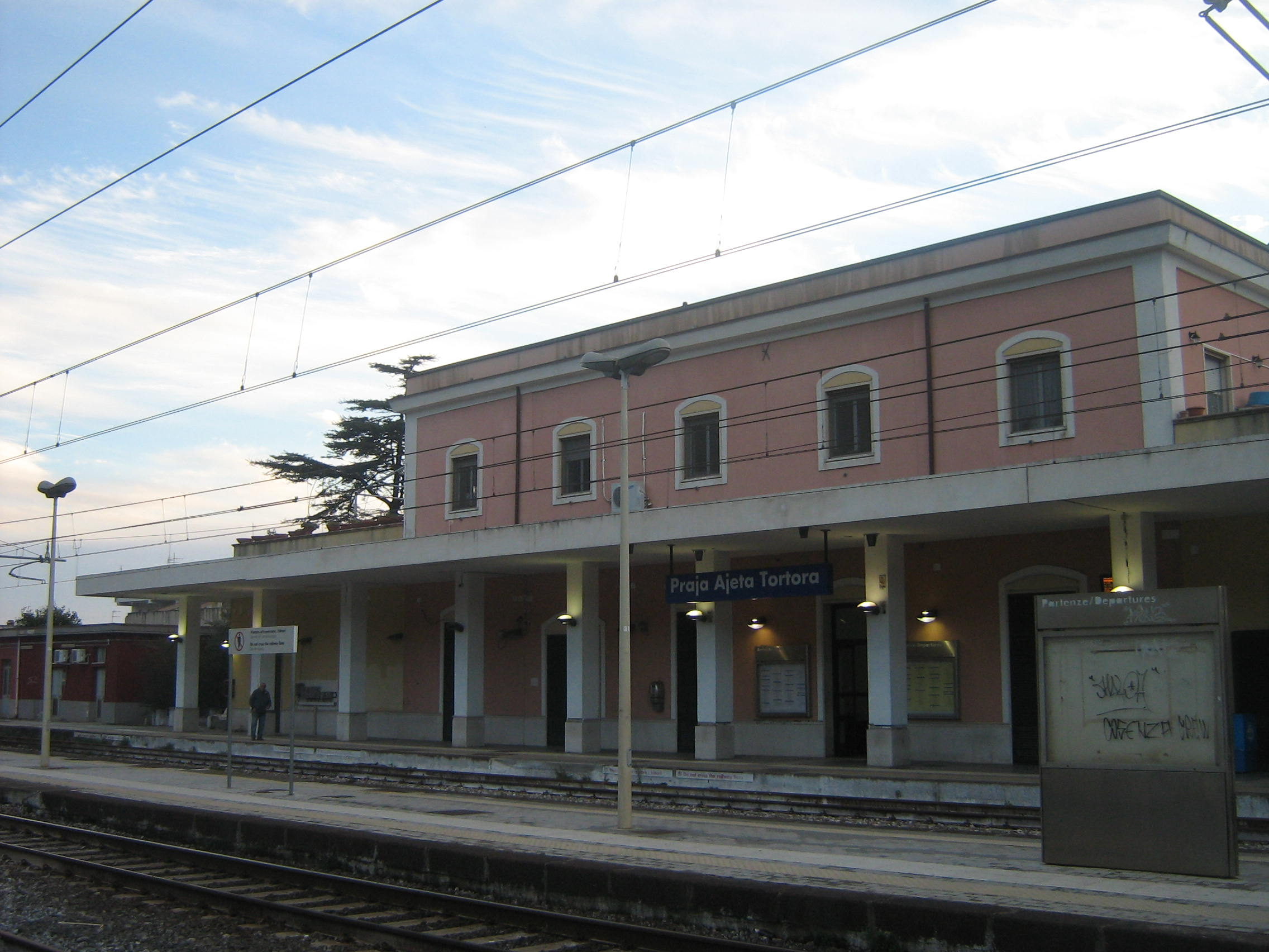 Fabbricato viaggiatori della stazione di Praia a Mare